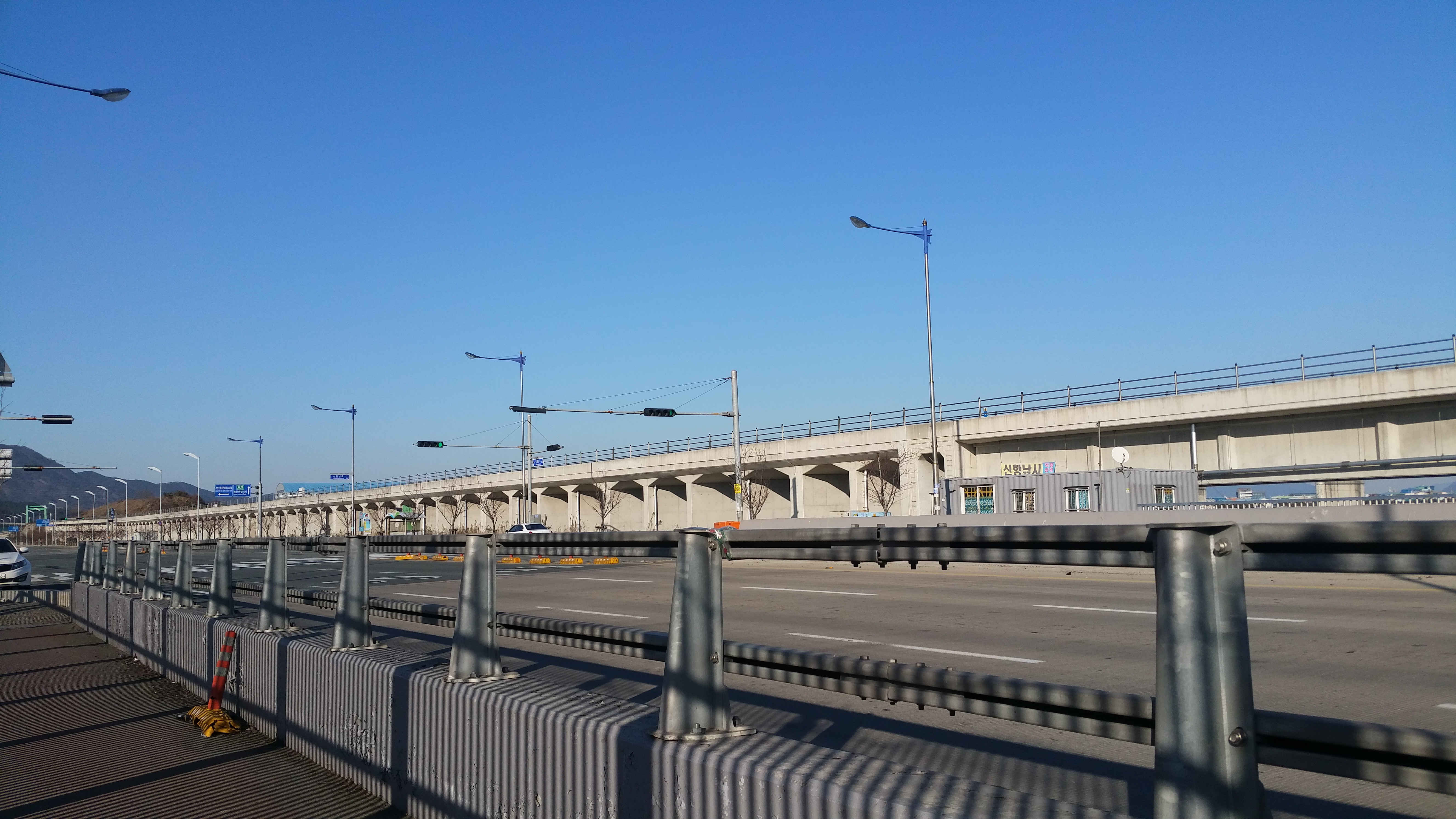 부산신항선 선로 교량.